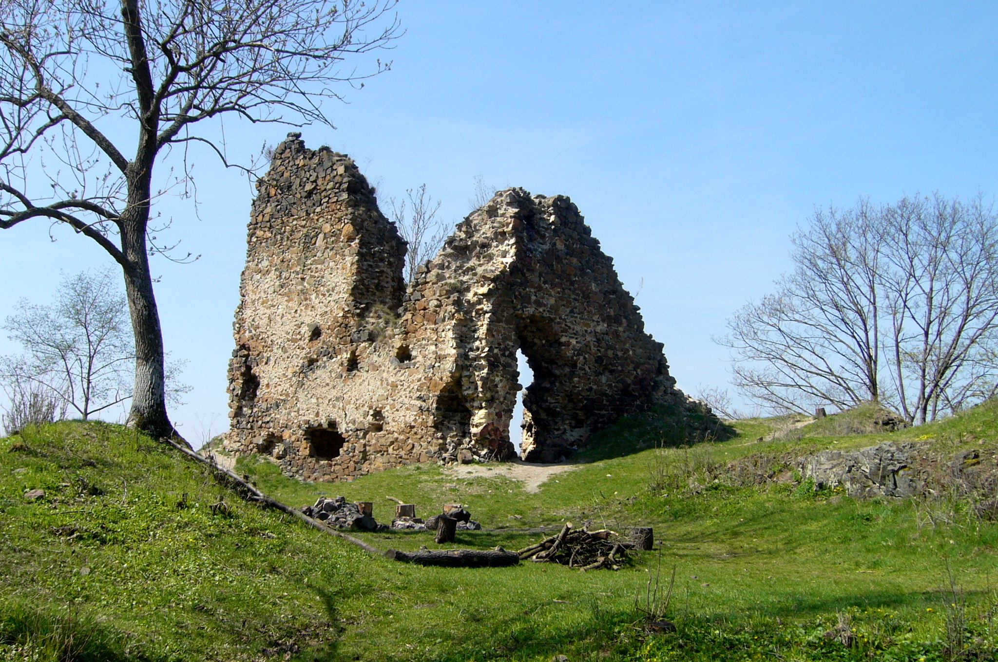 Donjon, Hrad Týřov, Karlova Ves (okres Rakovník).